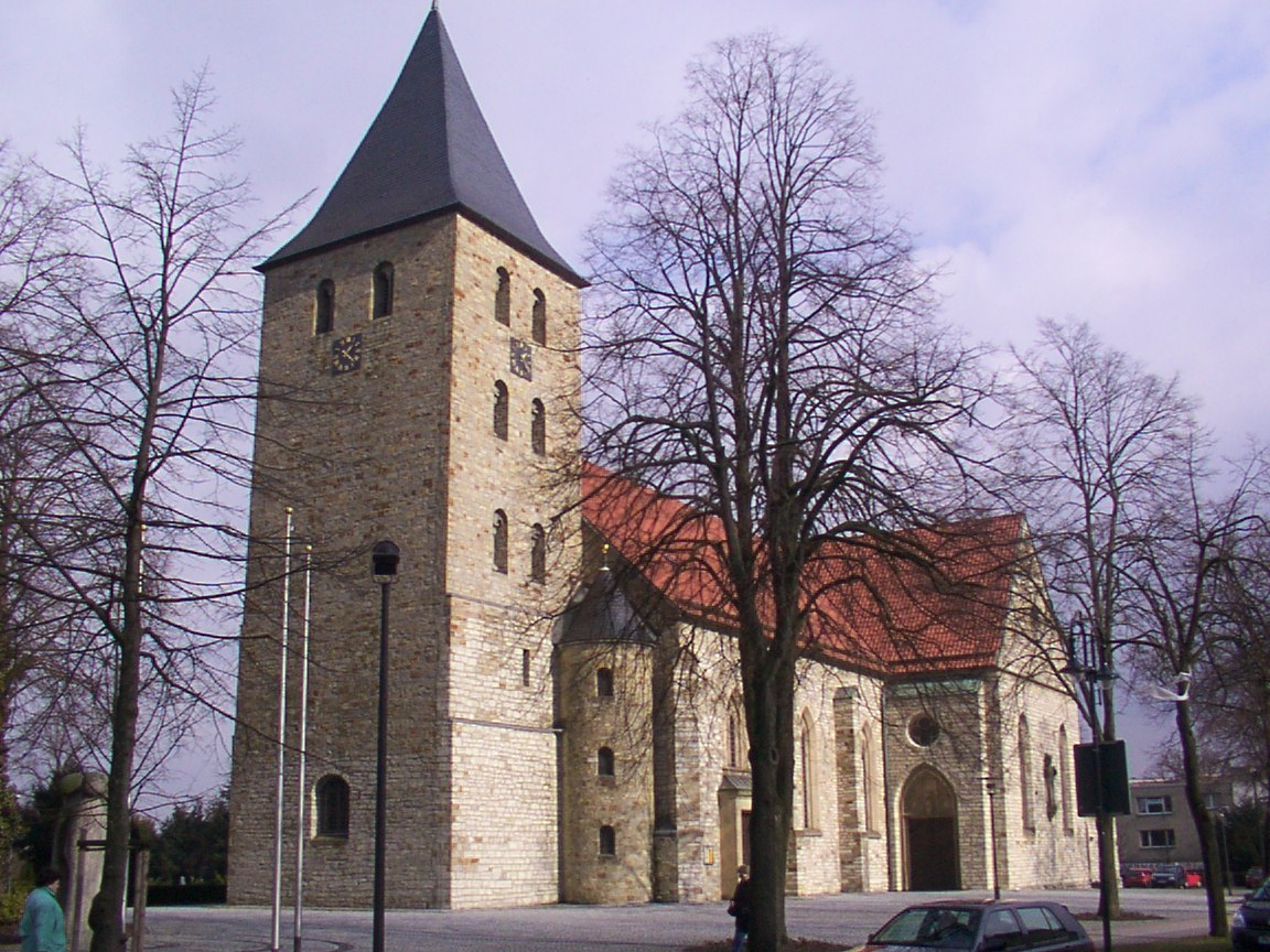 Paderborn: Katholische Kirche Sankt Dionysius in Elsen